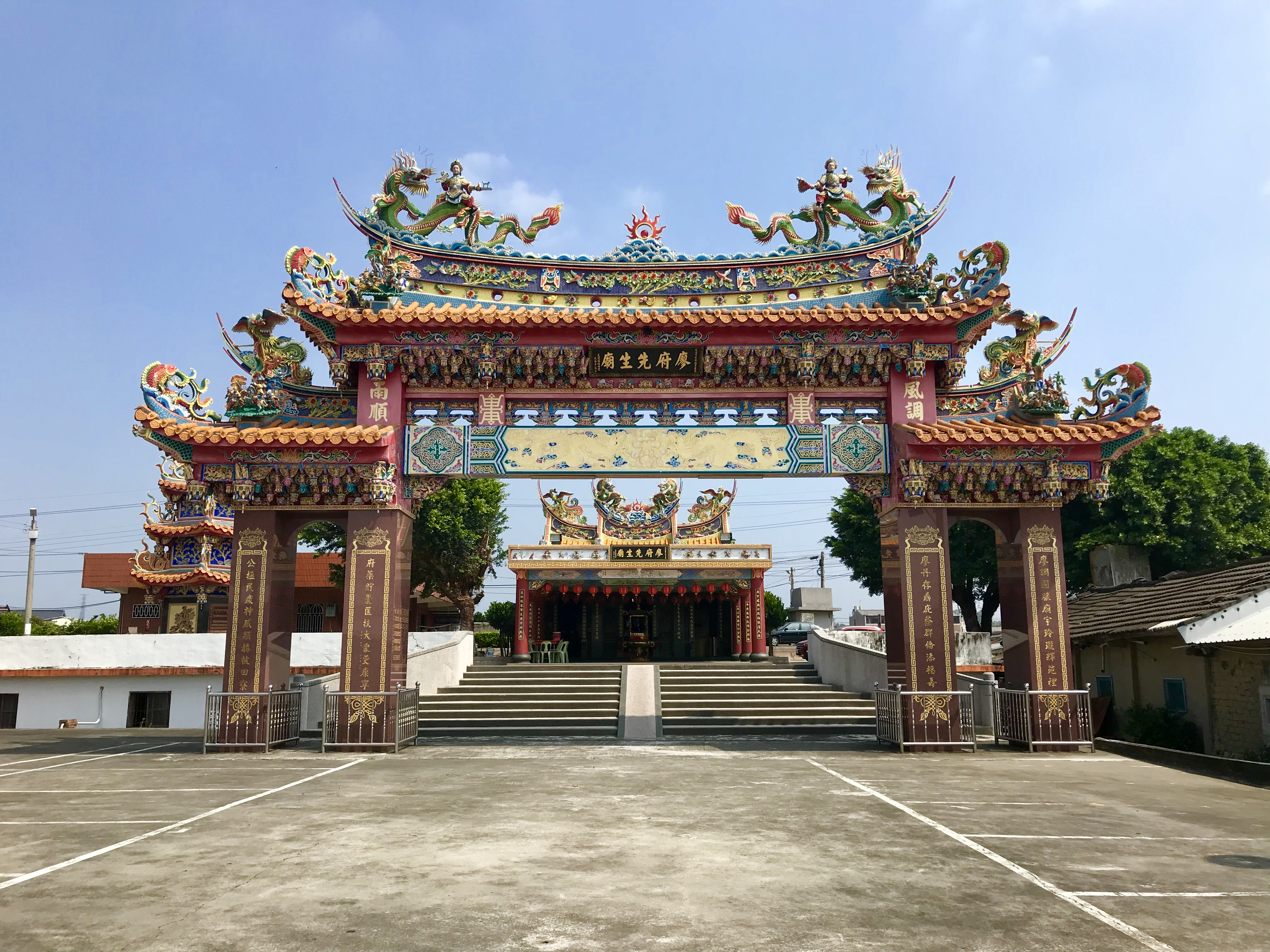 中文（台灣）: 廖府先生廟遠照